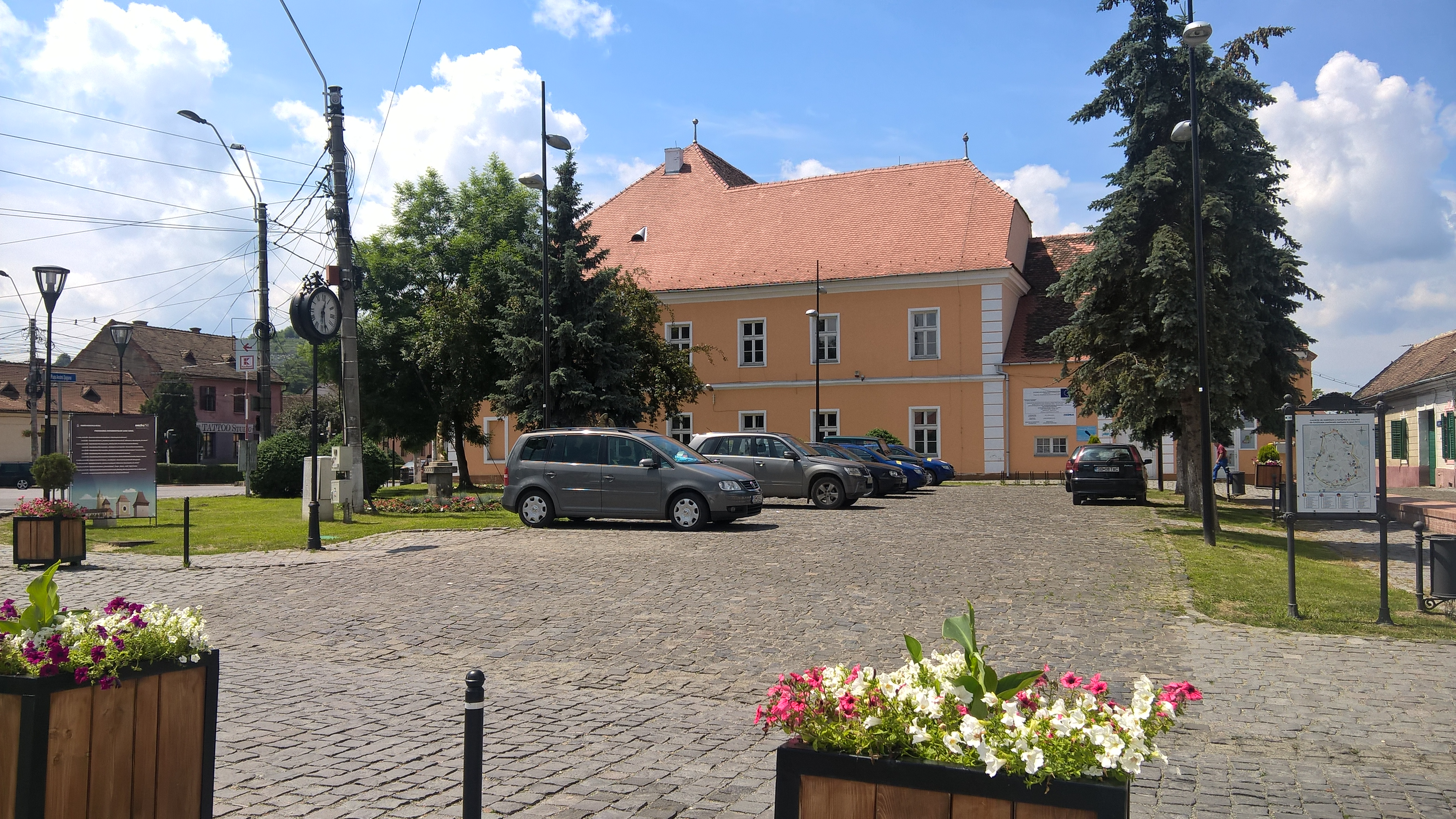 Fosta Cazarmă a Husarilor